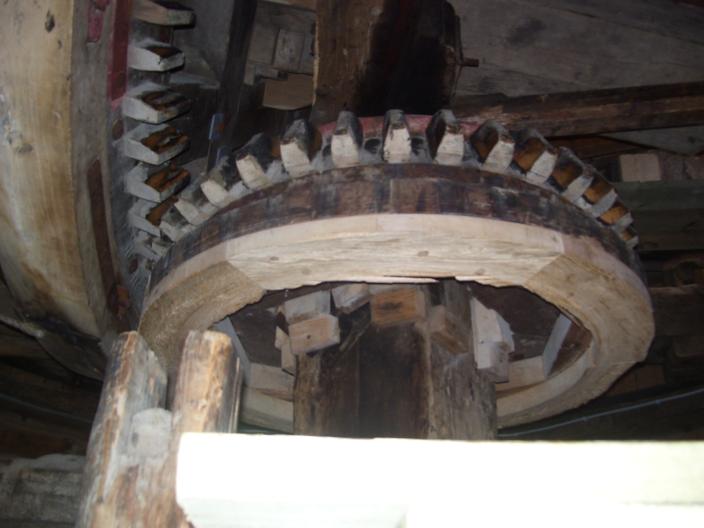 kamhjul i Skenkelsø Mølle